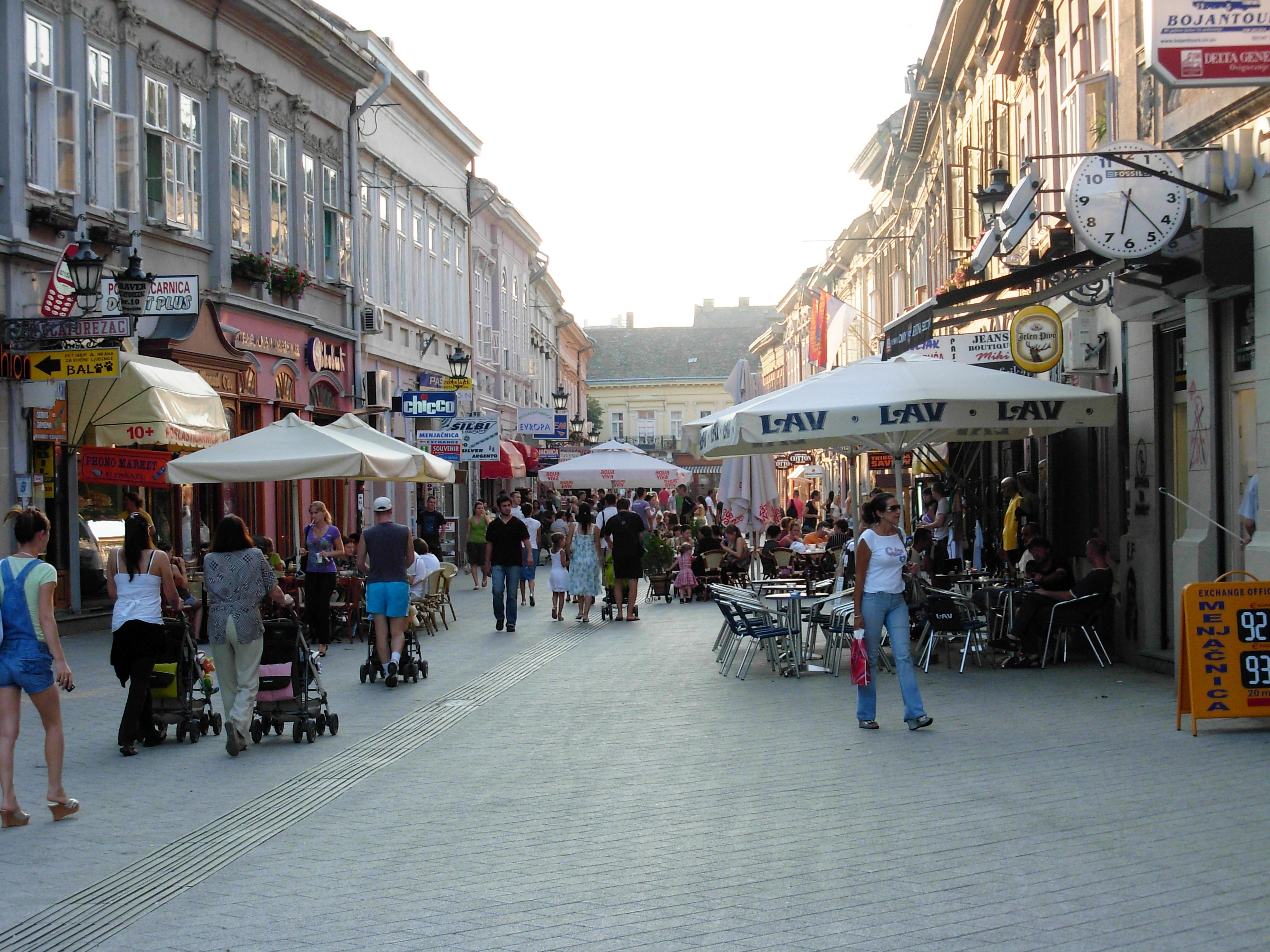 Dunavska ulica u Novom Sadu.